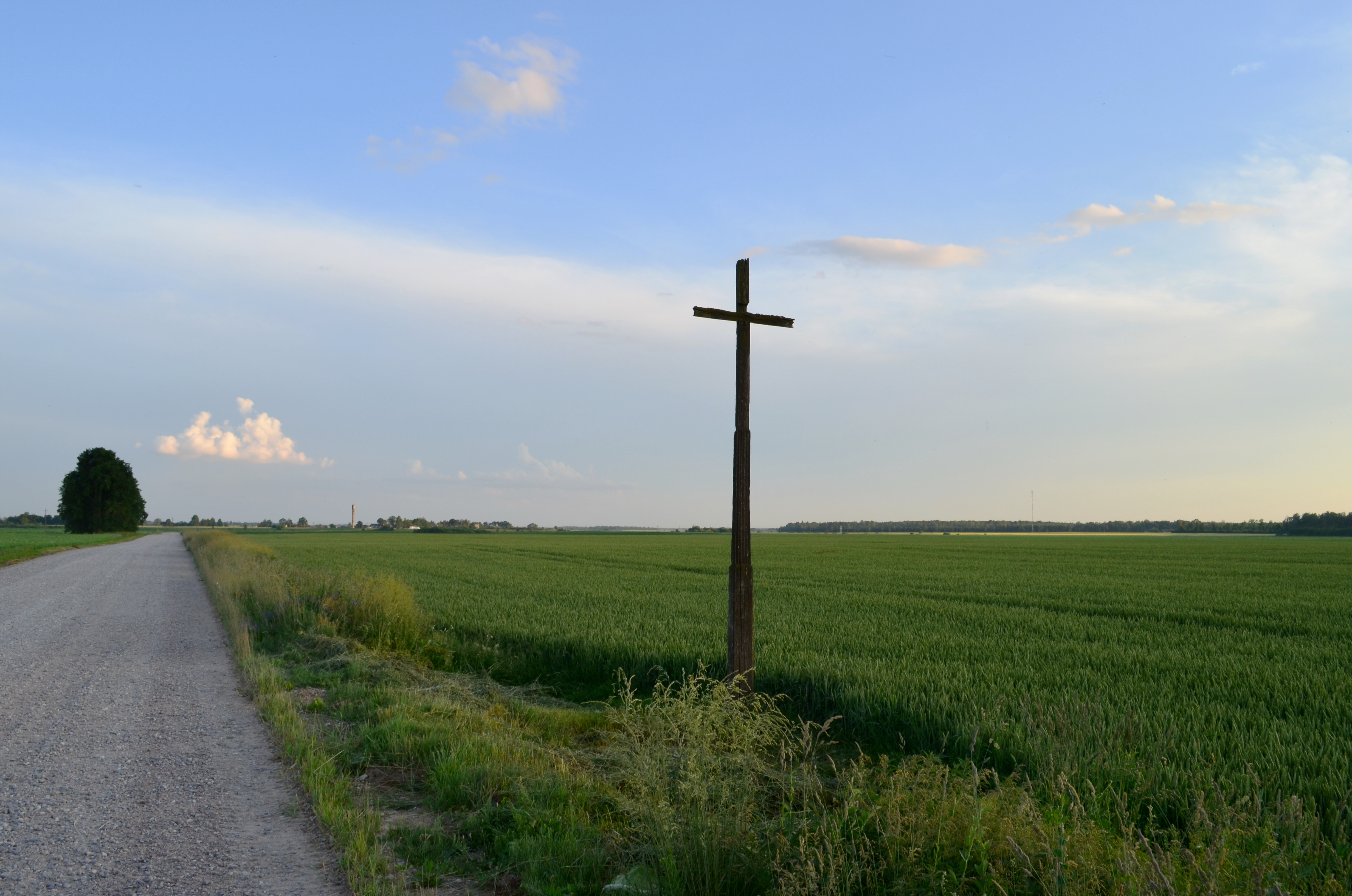 Gaižūnai, Bukonių s., Jonavos r.